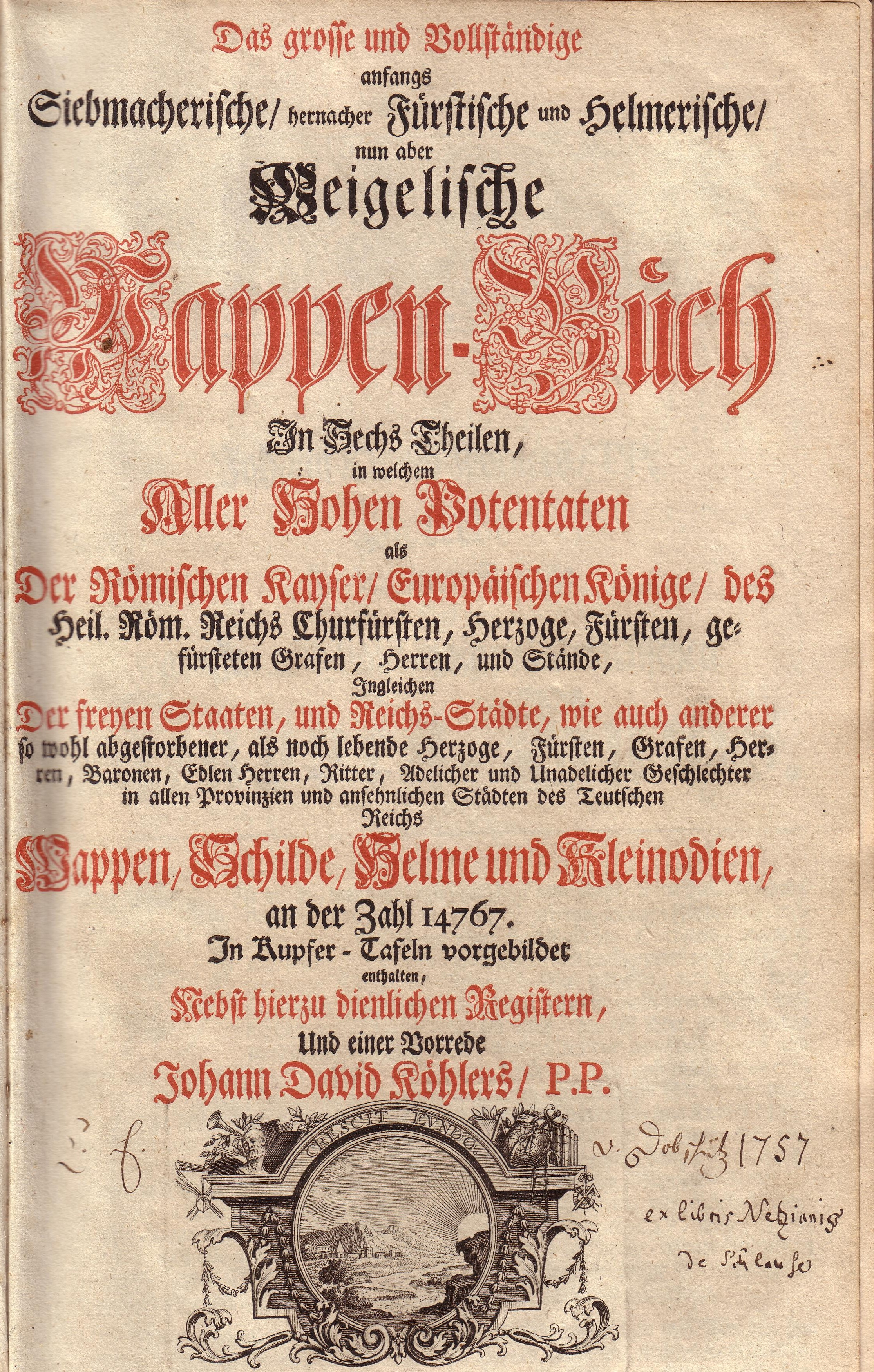 Корица на Гербовника на Кристоф Вайгел от 1734